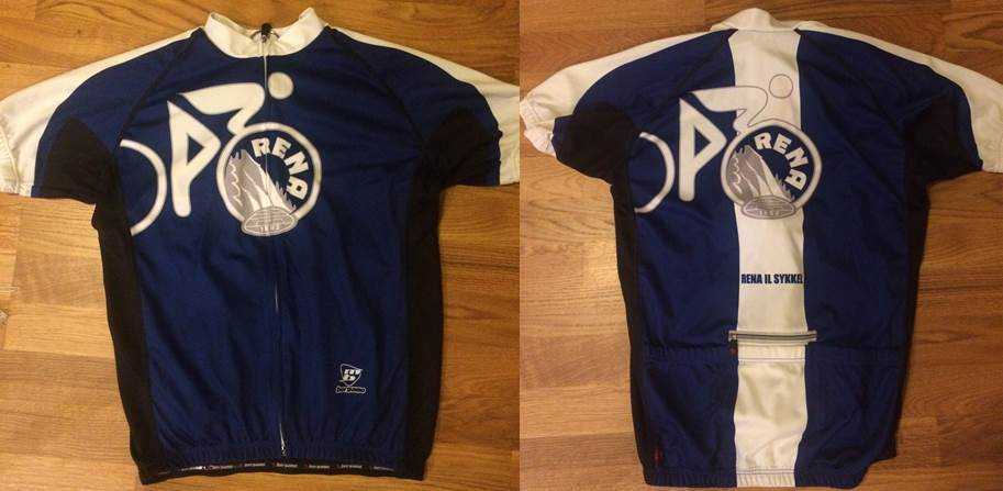 Sykkeldrakt Rena IL